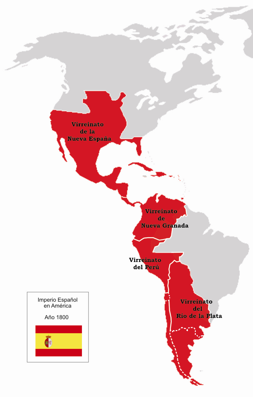 Mapa del imperio español en América en 1800. Ver discusión